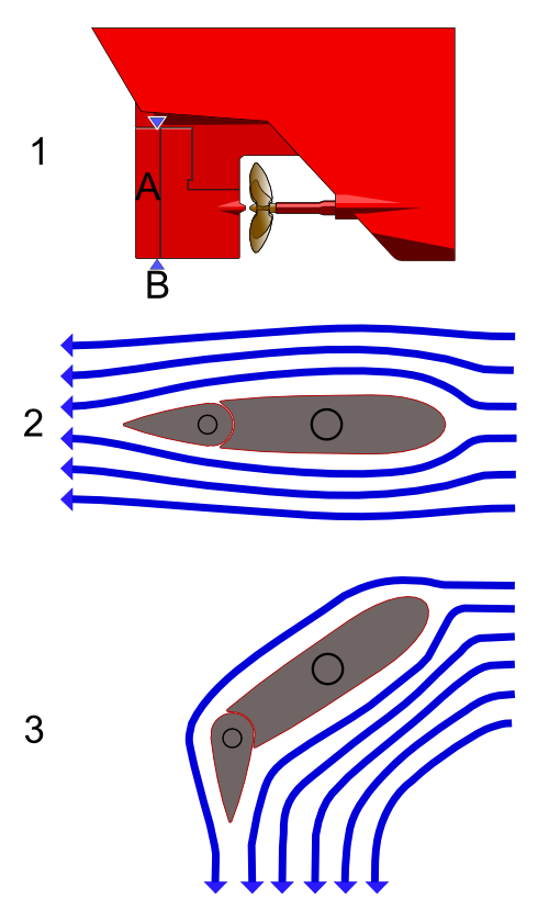 Ruderanlage mit zusätzlicher Klappe. Diagramme der Wasserströmung und Geradeauslage und Ruder Steuerbord)